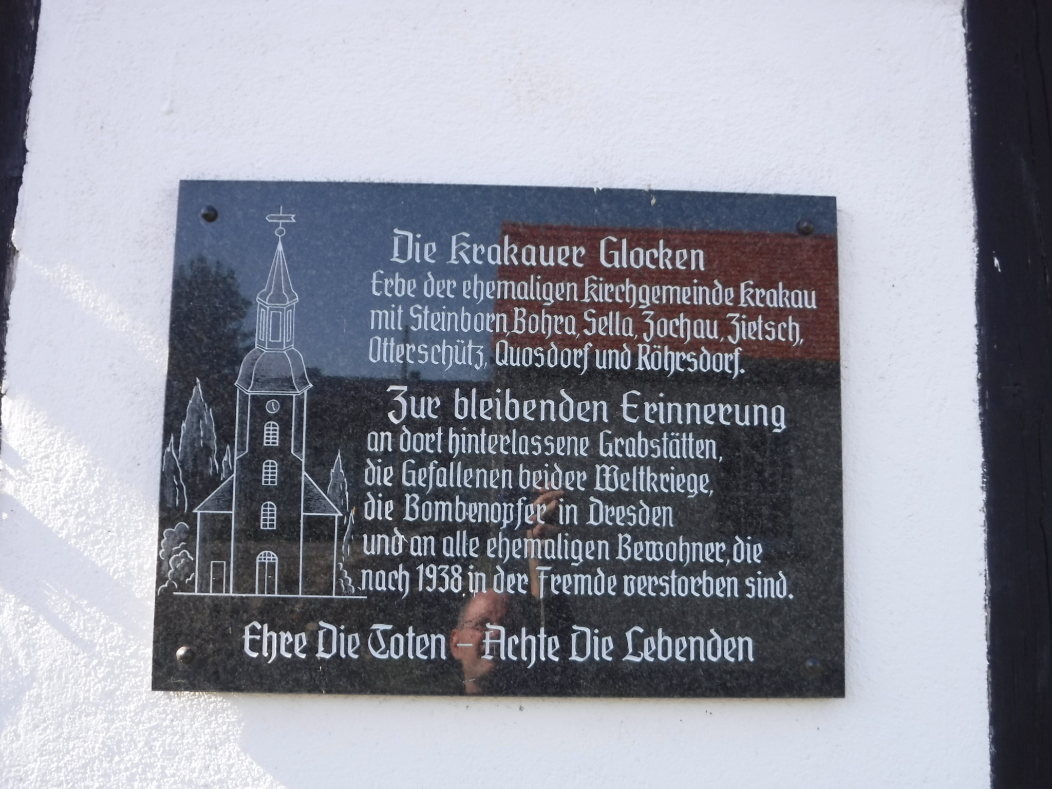 Der Friedhof in Röhrsdorf (Königsbrück) Gedenktafel: Die Krakauer Glocken Erbe der ehemaligen Kirchgemeinde Krakau mit Steinborn, Bohra, Sella, Zochau, Zietsch, Otterschütz, Quosdorf und Röhrsdorf. Zur bleibenden Erinnerung an dort hinterlassene Grabstätten, die gefallenen beider Weltkriege, die Bombenopfer in Dresden und an alle ehemaligen Bewohner, die nach 1938 in der Fremde verstorben sind. Ehre die Toten – Achte die Lebenden